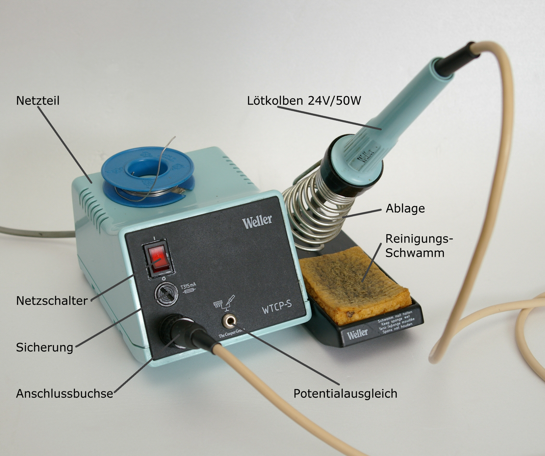 Loetstation Weller WTCP-S, 50 Watt. Temperaturregelung über Magnastat™-System durch Auswechseln der Loetspitzen.